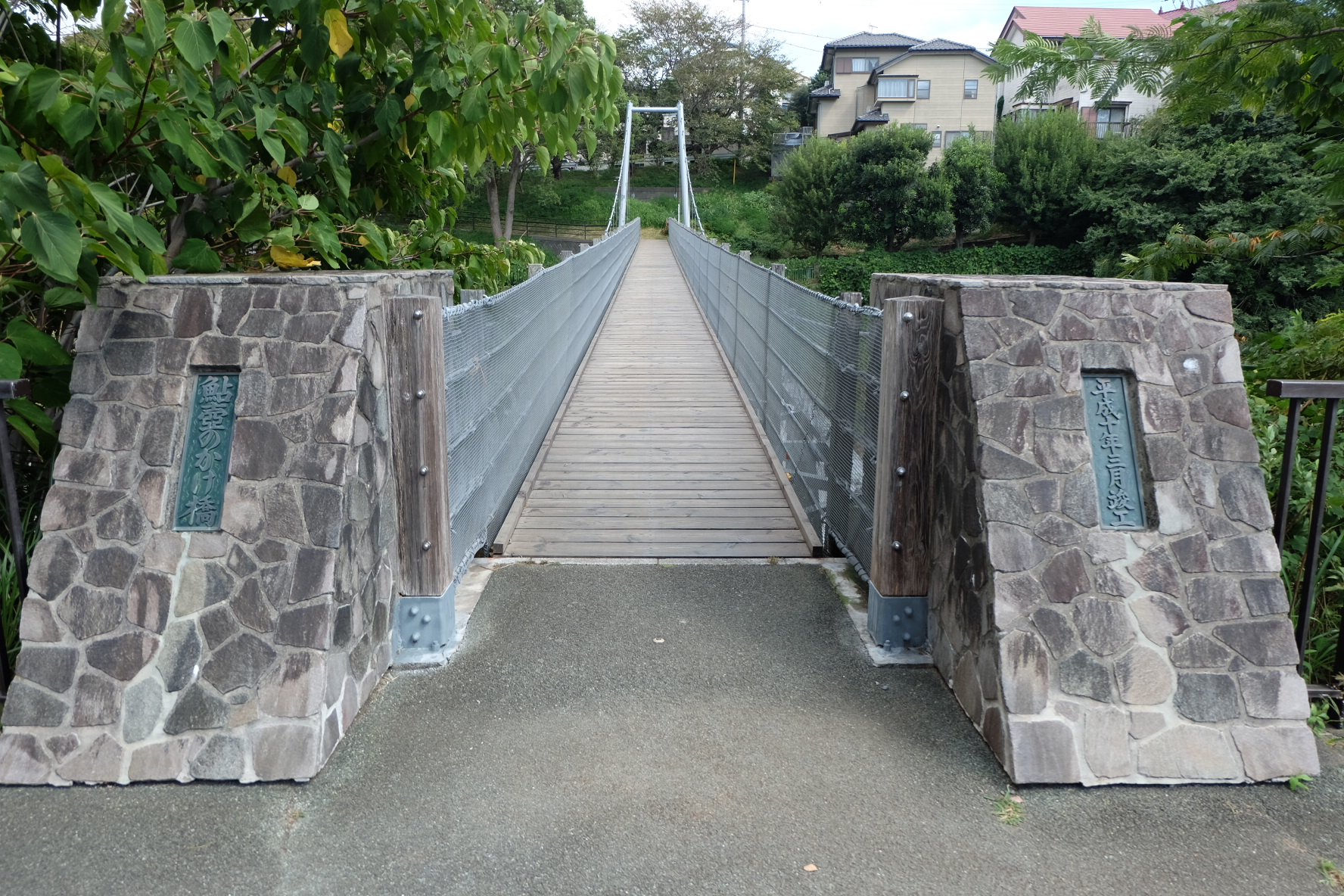 鮎壺のかけ橋(沼津市側から撮影した写真)